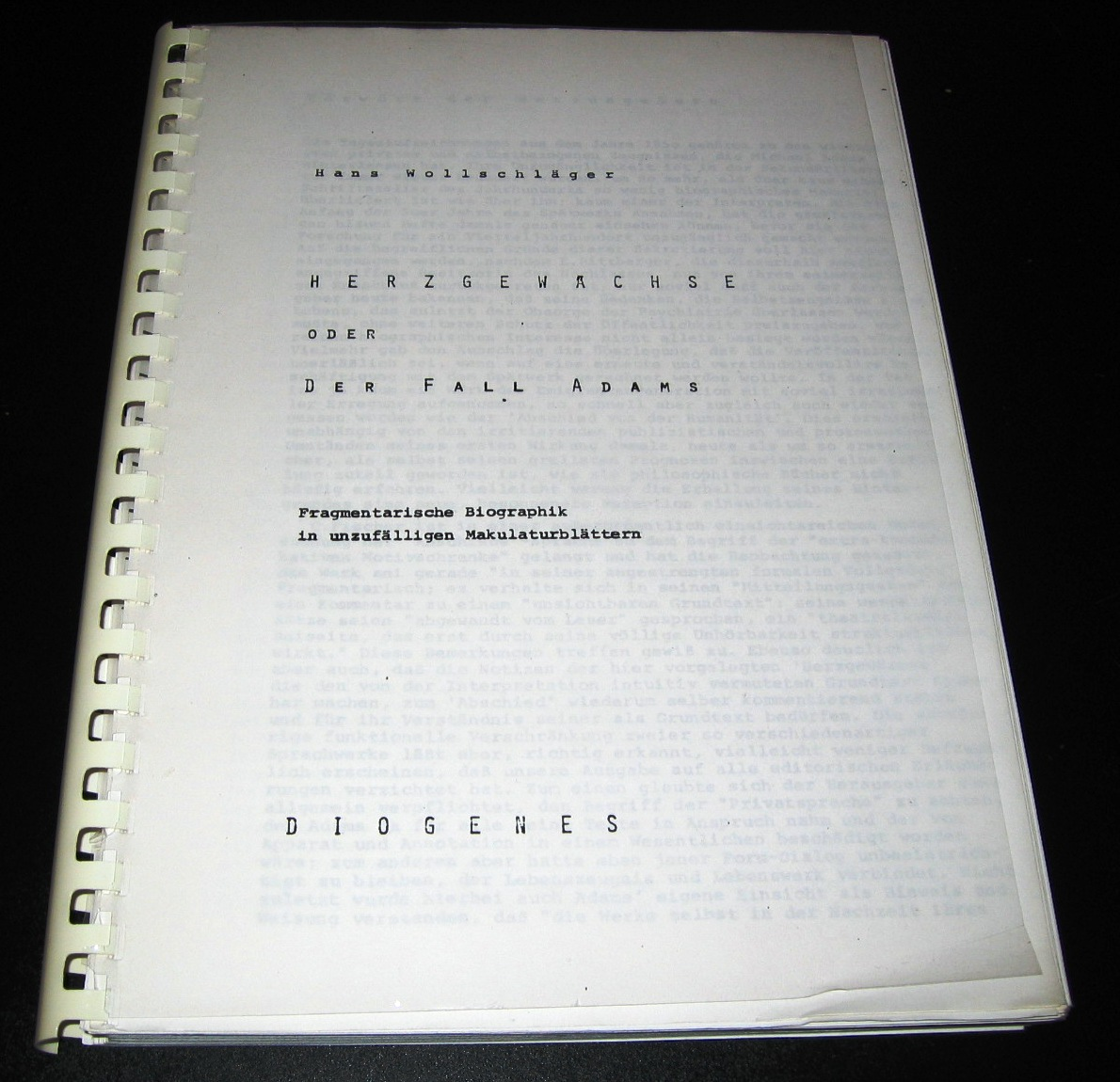 Spiralgebundene Leseprobe von Hans Wollschlägers Herzgewächse oder Der Fall Adams für die Diogenes Verlagsvertreter (1978). Das 169 einseitig beschriebene Seiten starke Typoskript umfasst die ersten 270 Seiten der 1982 veröffentlichten gedruckten Fassung der Herzgewächse. 5 Bll., DIN A 4. Spiralbindung. Vollständige Fotokopie des "Bamberg, im Herbst 1978" datierten Typoskripts für den Diogenes Verlag, der den Druck der 'Herzgewächse' damals angekündigt hat.